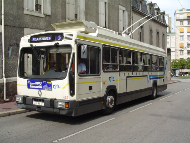 Trolleybus ER100.2 Photo prise le 30 juin 2004. Gourari Ibrahim